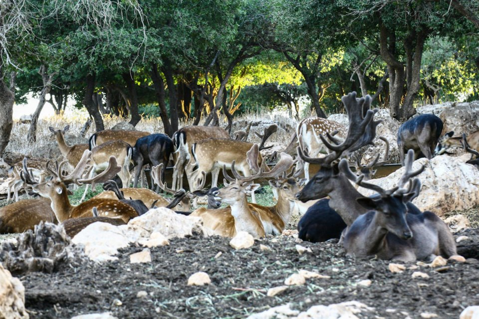 مجموعة من الأيائل السمراء الأوروبية في غابات برقش.